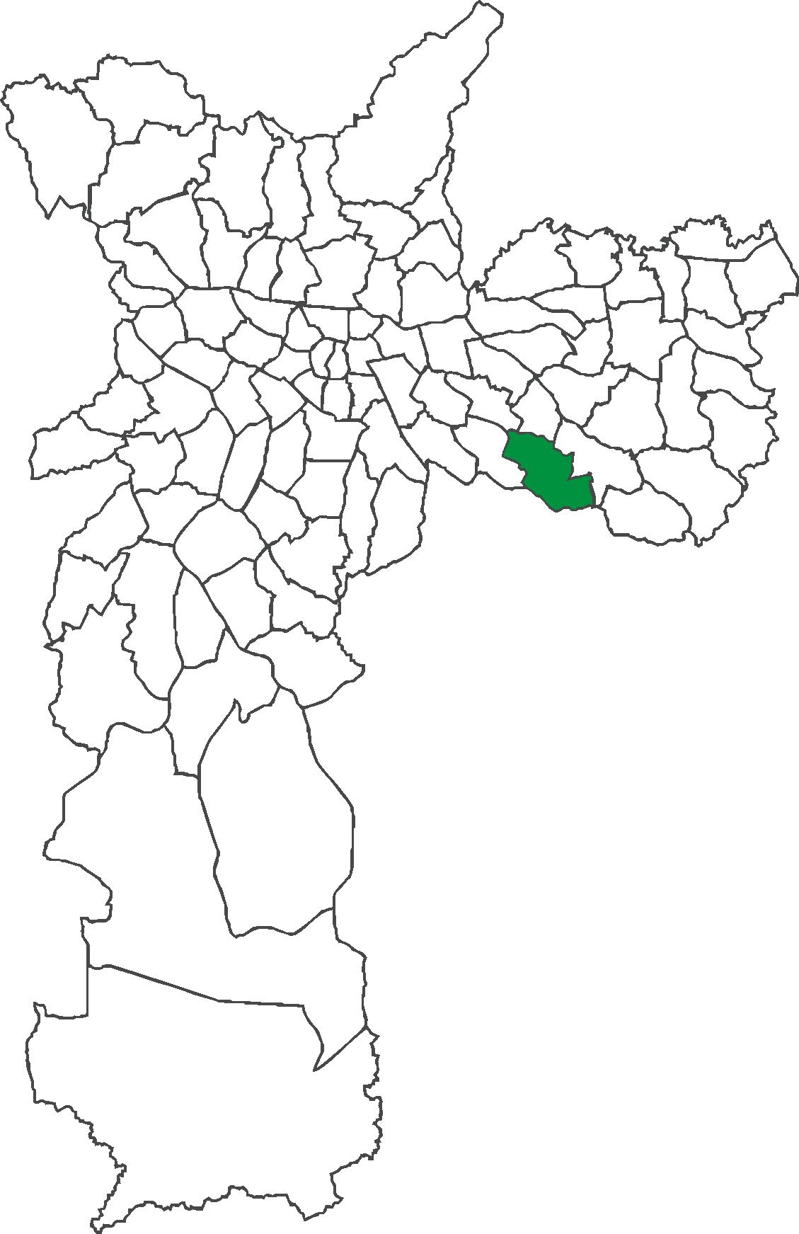 Localização do distrito de Sapopemba no município de São Paulo.